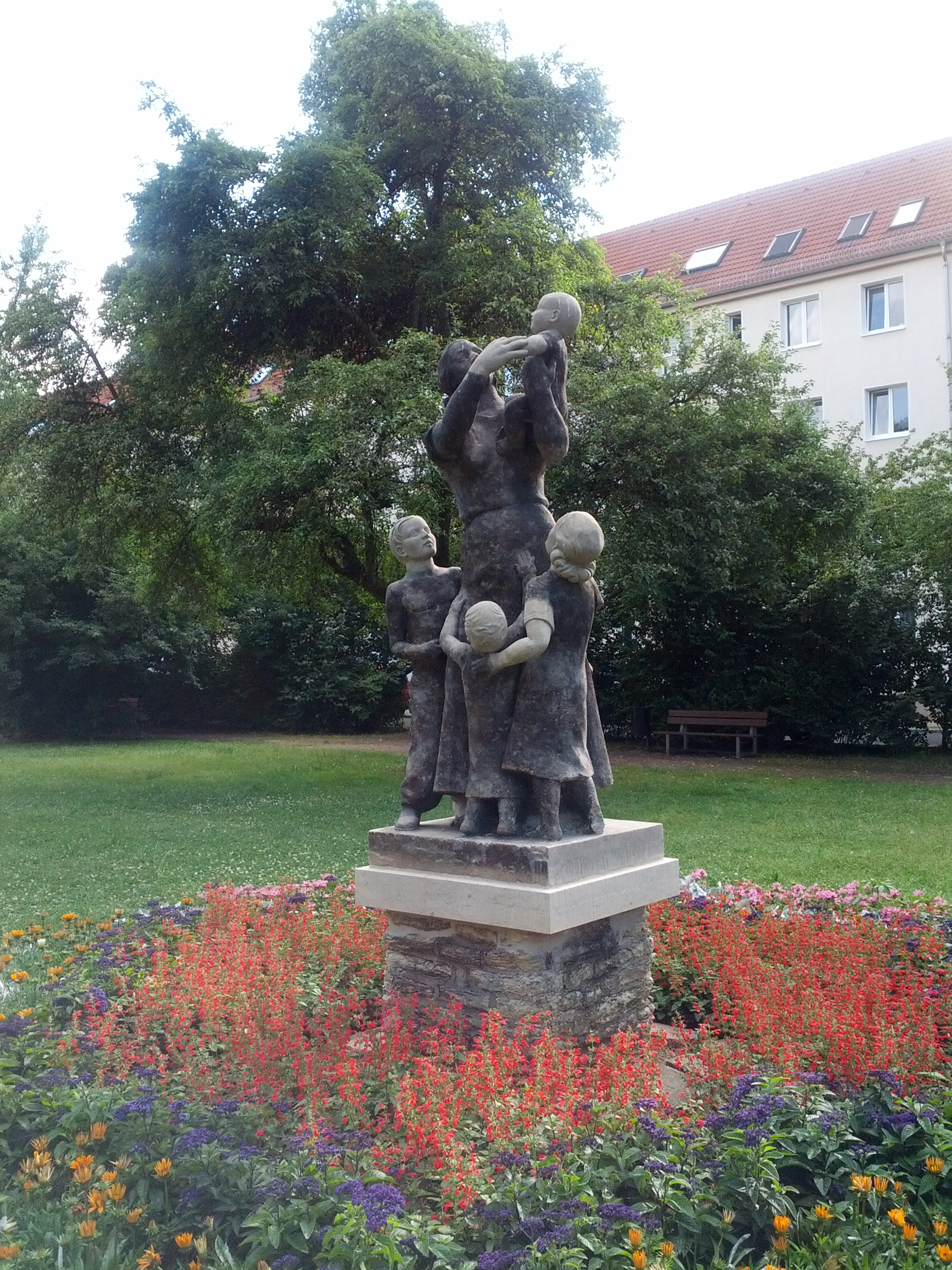 Plastik "Mutter mit Kindern" am Hepkeplatz in Dresden von Ernst Hermann Grämer